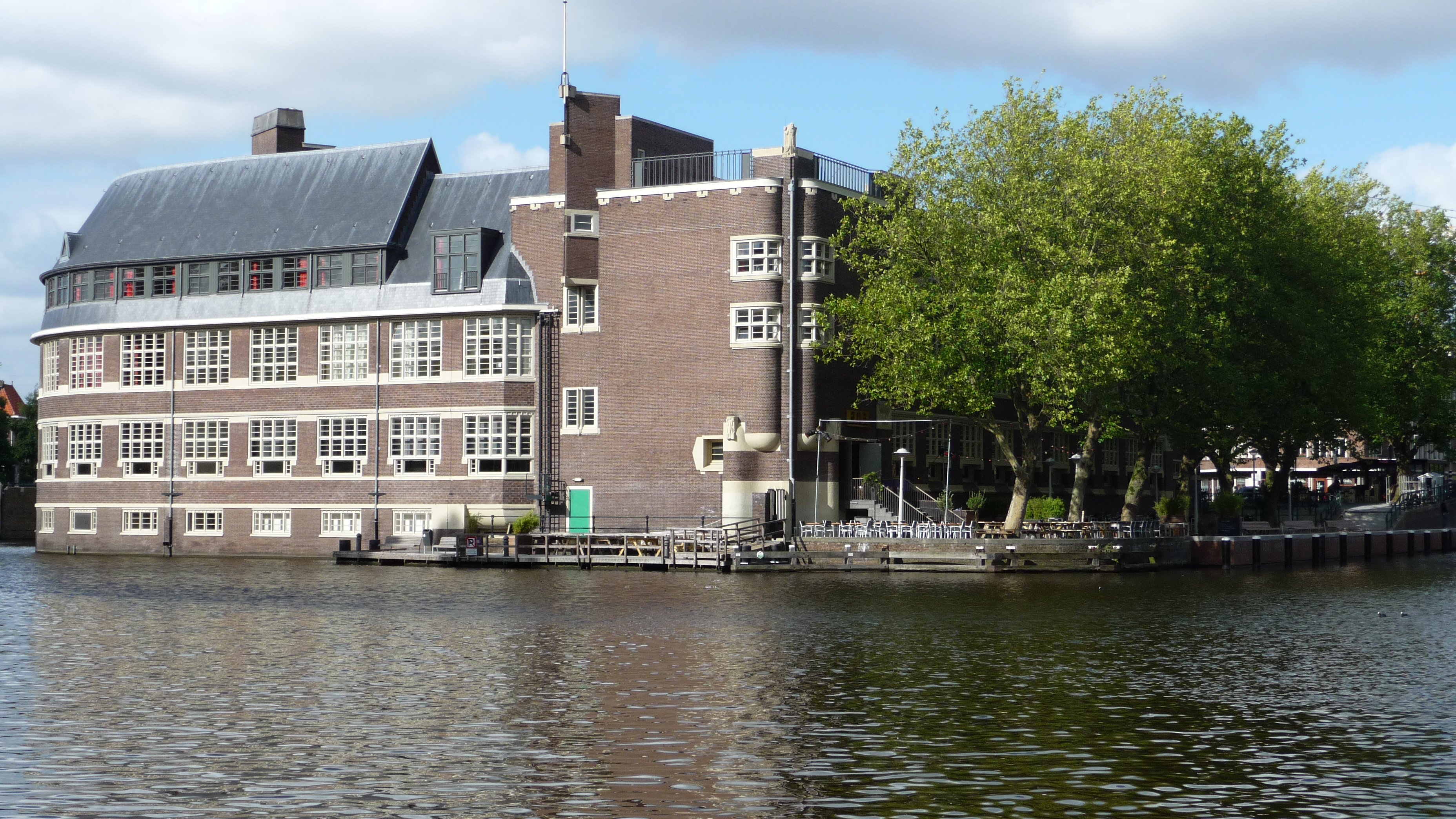 Rijksmonument Postjesweg 1, Amsterdam